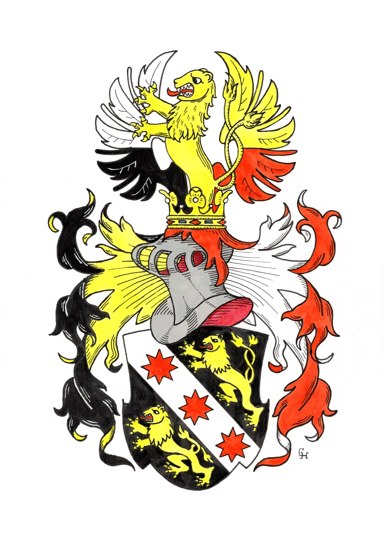 Wappen des kaiserlichen Hofbankiers Jacob Bassevi (1580–1634), verliehen zusammen mit dem Prädikat "von Treuenberg" 1622. Zeichnung von Gerd Hruška ( Für weitere Informationen zu dieser Standeserhebung siehe (